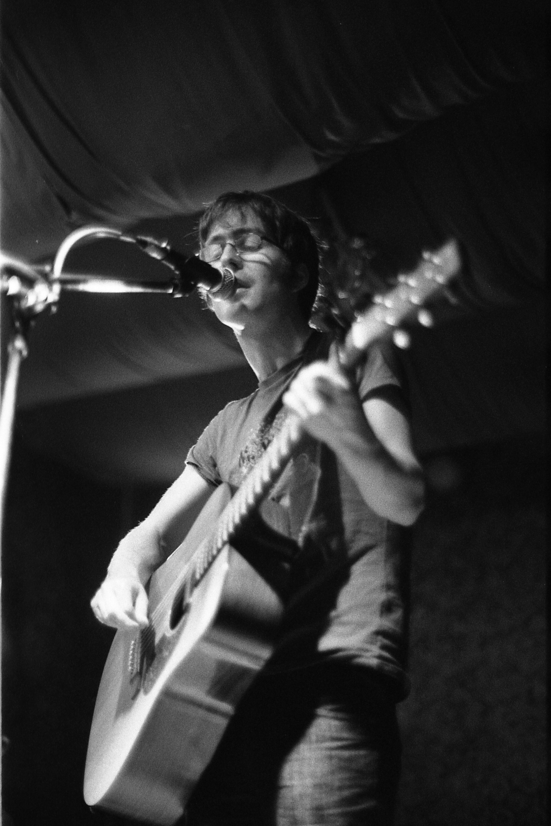 Schokoladen / Berlin / December 3rd 2009